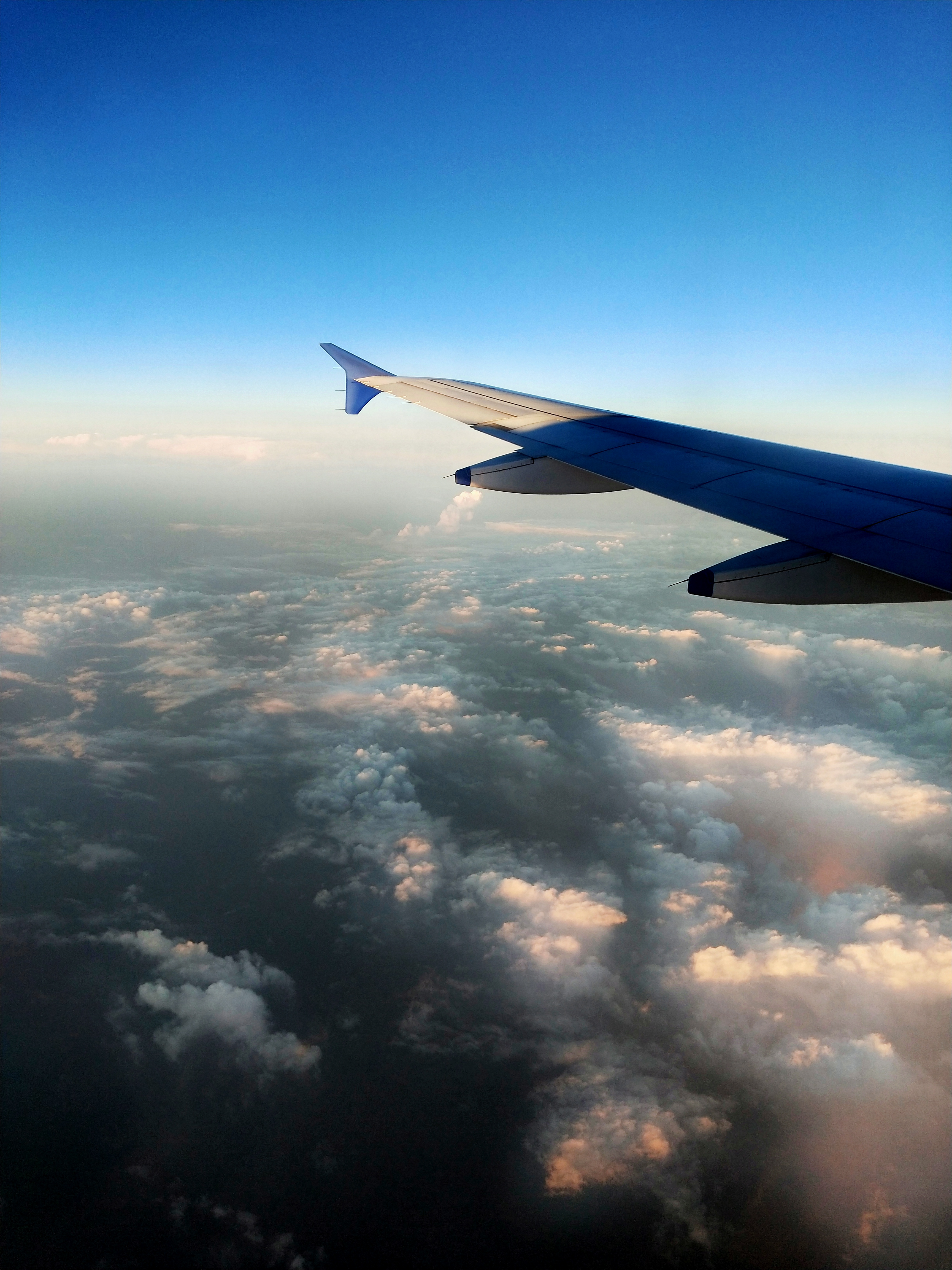 विमान की खिड़की से बादलों का दृश्य